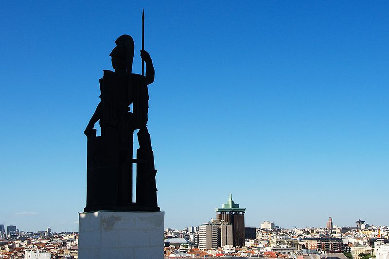 Atenea, Círculo de Bellas Artes de Madrid